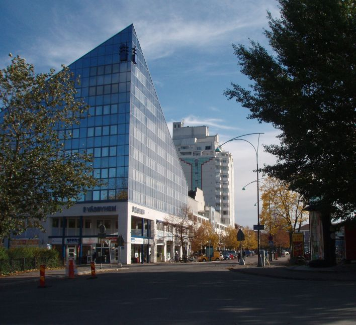 View from Upplands Väsby